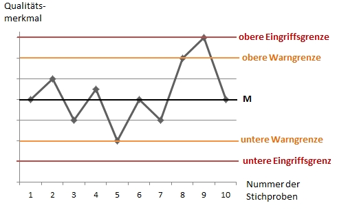 Beispiel für eine Shewhart-Regelkarte